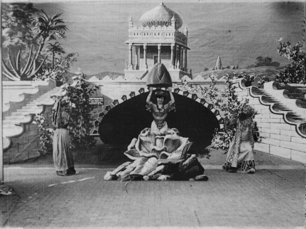 Image du film Le Rosier miraculeux (1904) de George Méliès